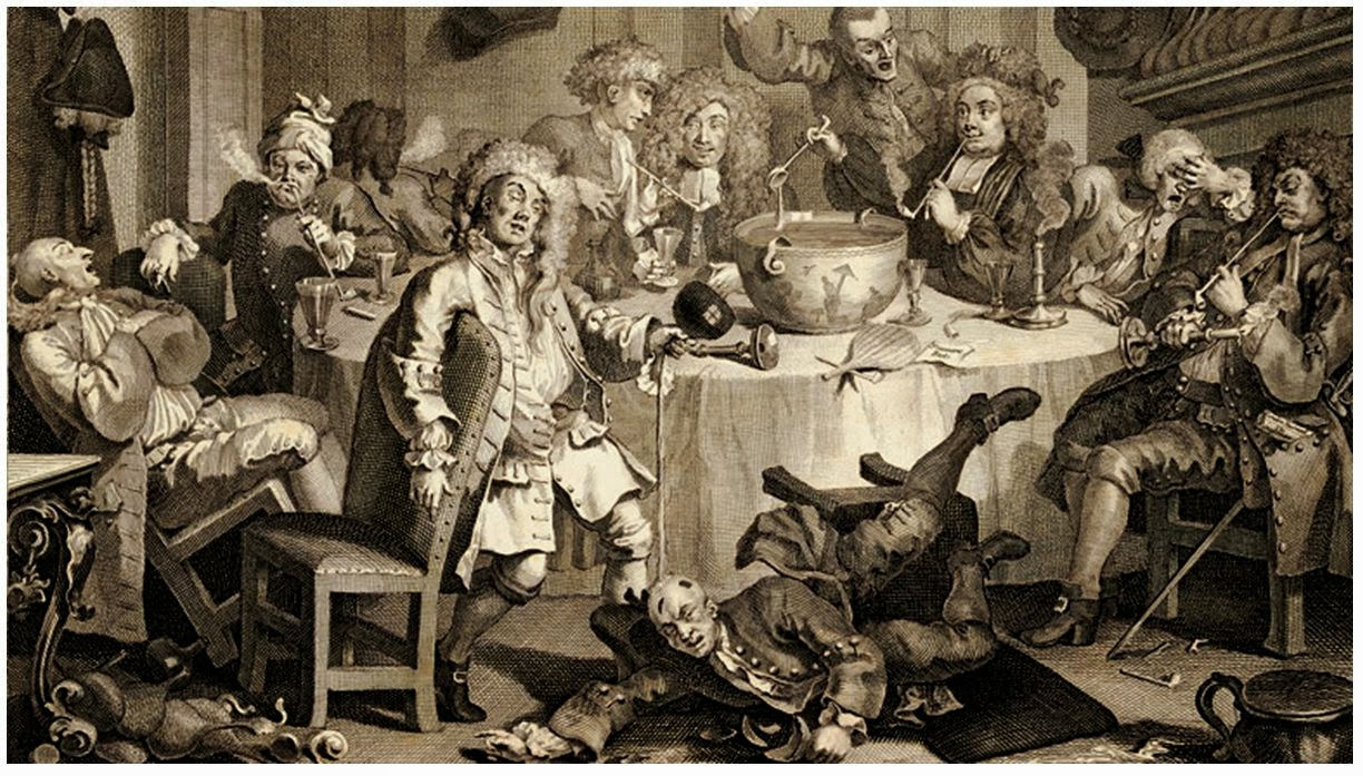 William Hogarth